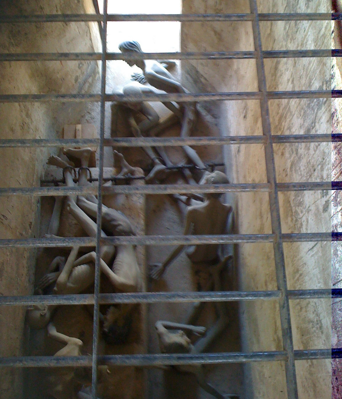 Einblick von oben in die Tigerkäfige